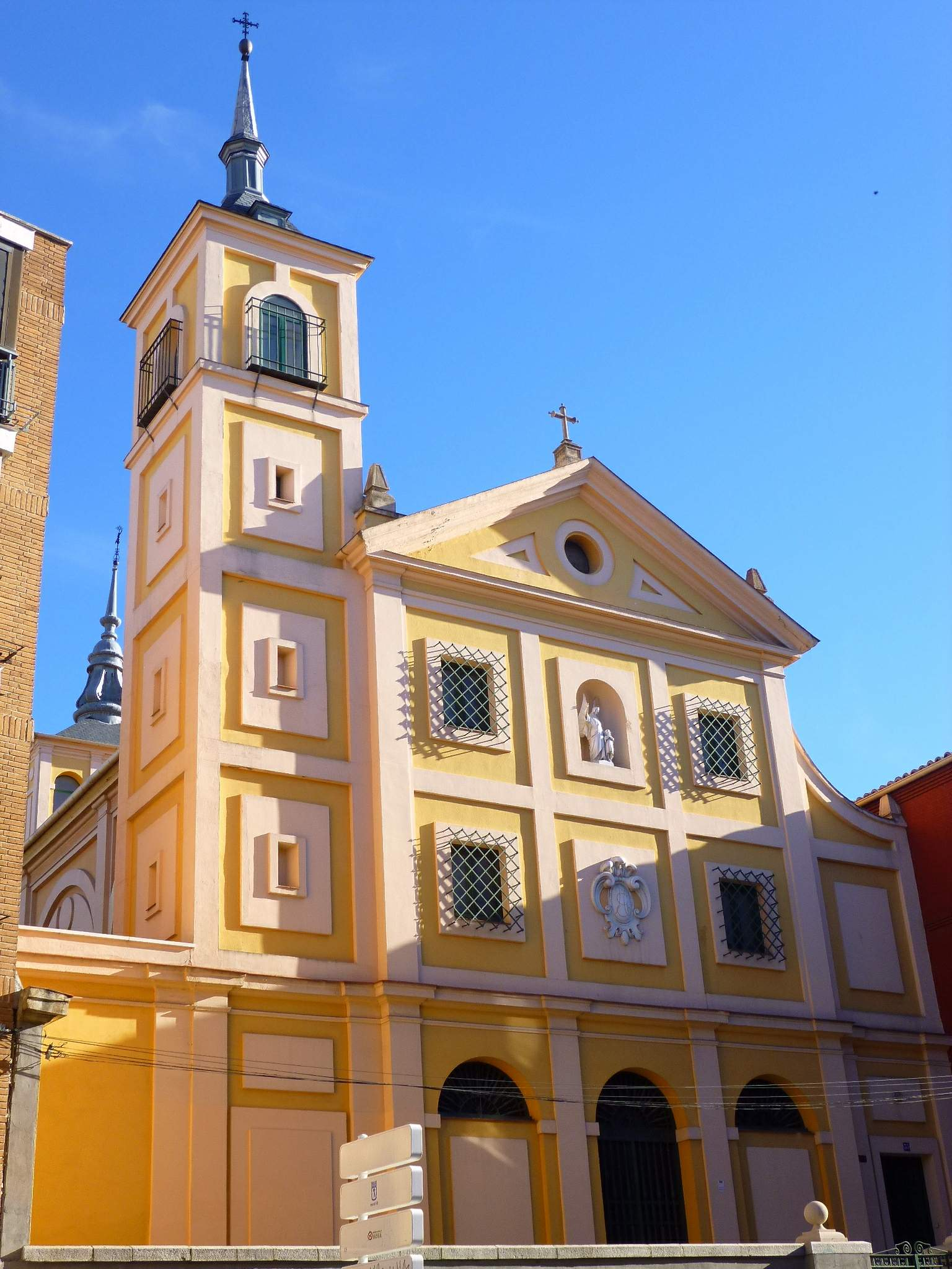 Iglesia de la Comunidad del Santo Ángel de la Guarda (Carabanchel, Madrid)